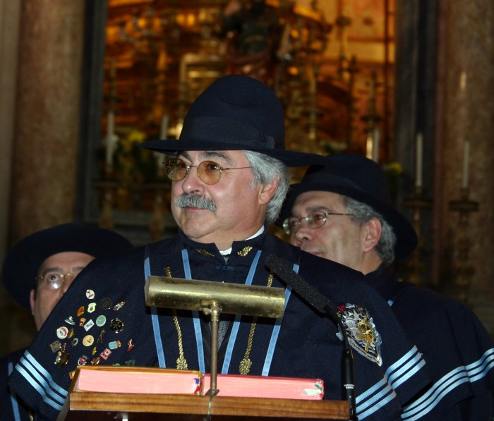 Grao-Mestre da Confraria dos Gastronomos do Algarve